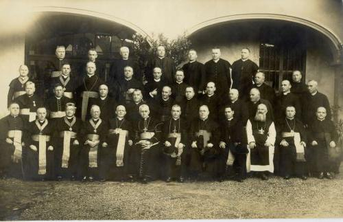 Sedemstoletnica Lavantinske škofije 1228-1928 (Ant. Bonav. Jeglič, Andrej Karlin, Matija Slavič, Franc Časl, Maks Vraber, Franc Moravec, Martin Matek, Ivan Tomažič, Mihael Umek, idr.)